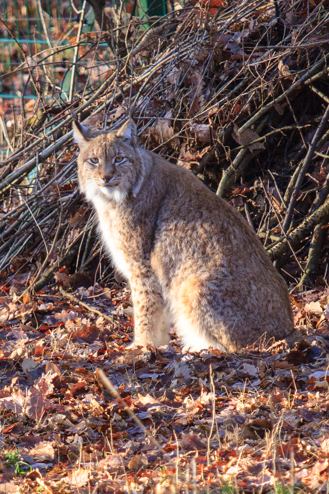 Luchs im Wildpark an den Eichen, Schweinfurt, 2012